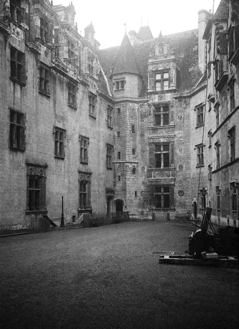 Imatge